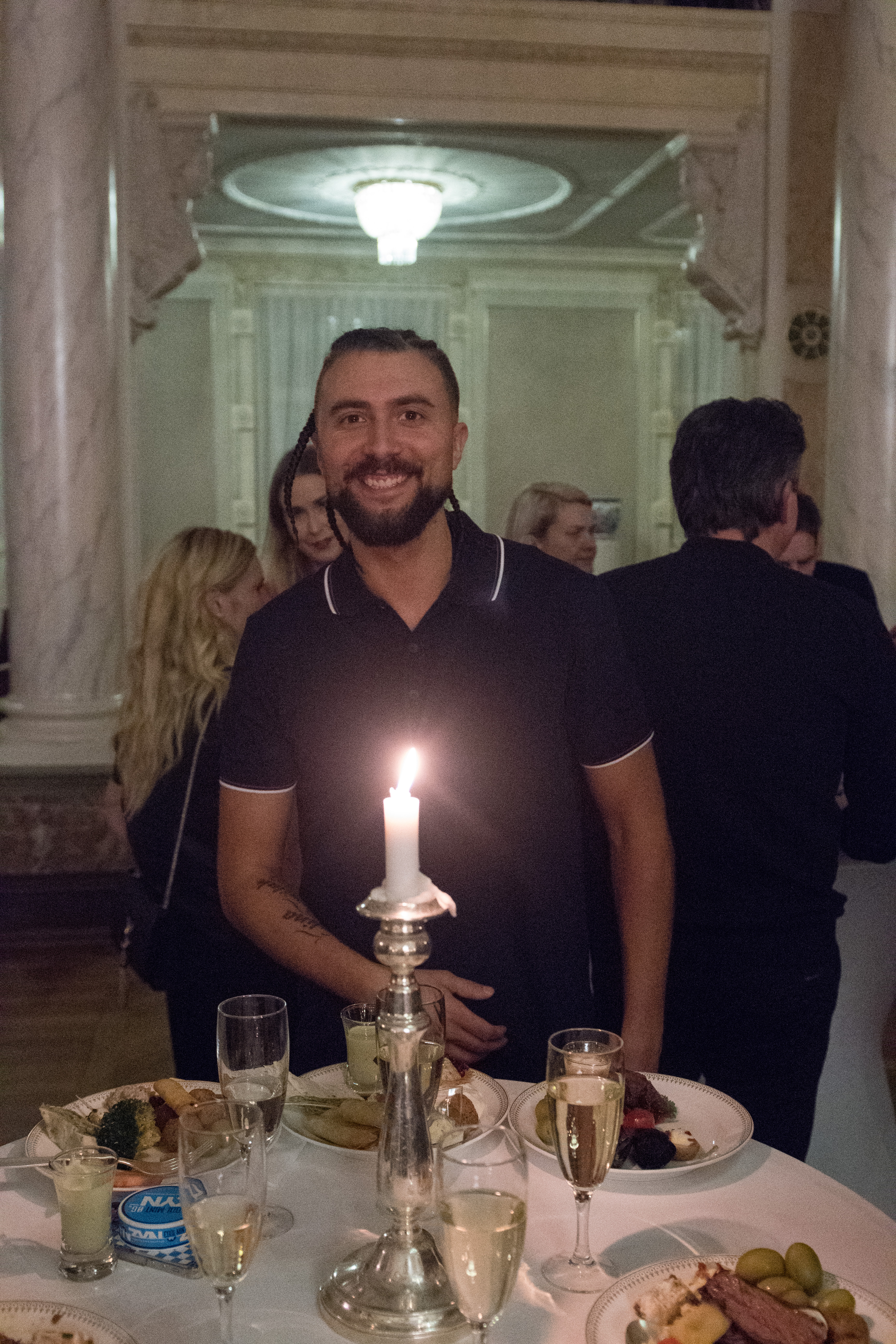 Moncho på välkommstfesten under torsdagen innan Melodifestivalen i Malmö 2018.